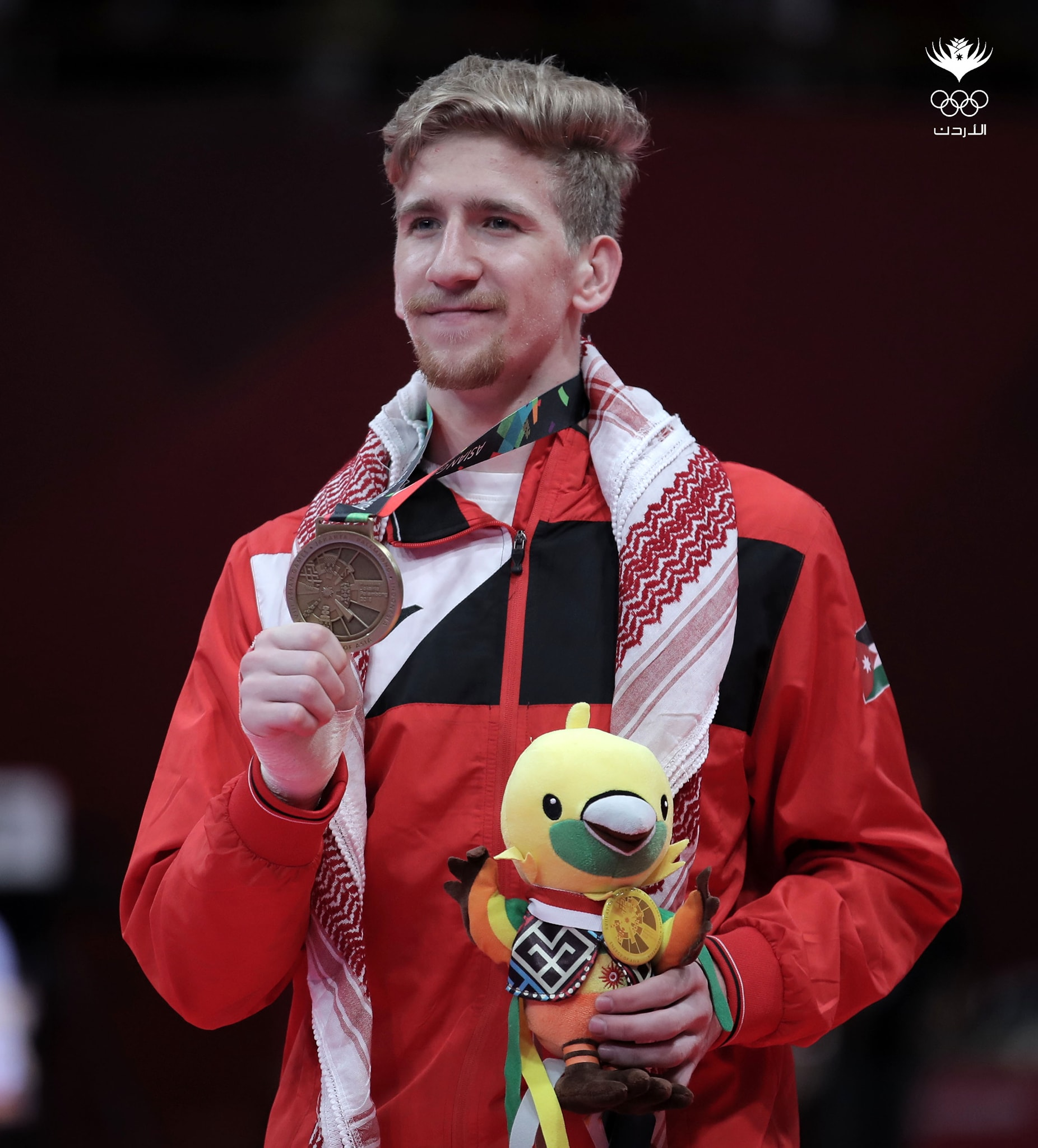 صالح الشرباتي يتوج بالميدالية البرونزية في دورة الألعاب الآسيوية (جاكرتا ٢٠١٨)